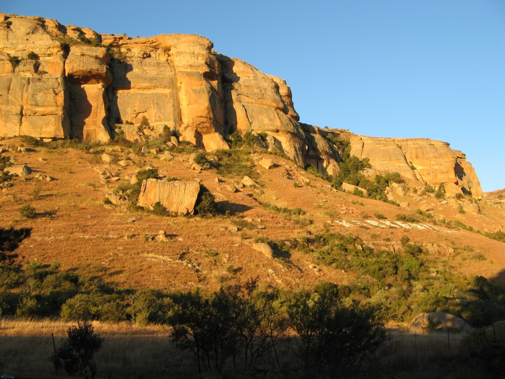 Kerkenberg, Retiefklip